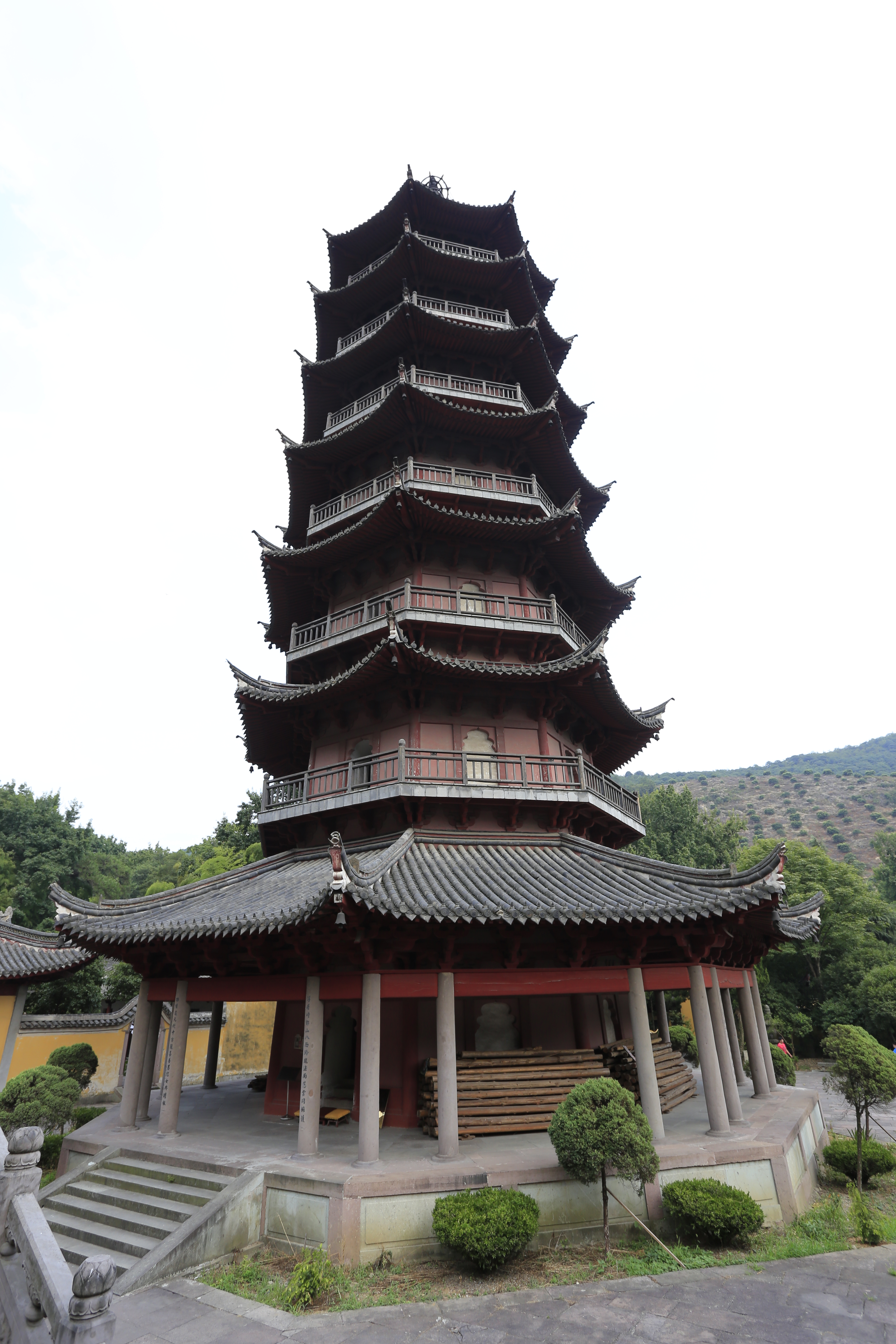 宁波阿育王寺 —— 东塔